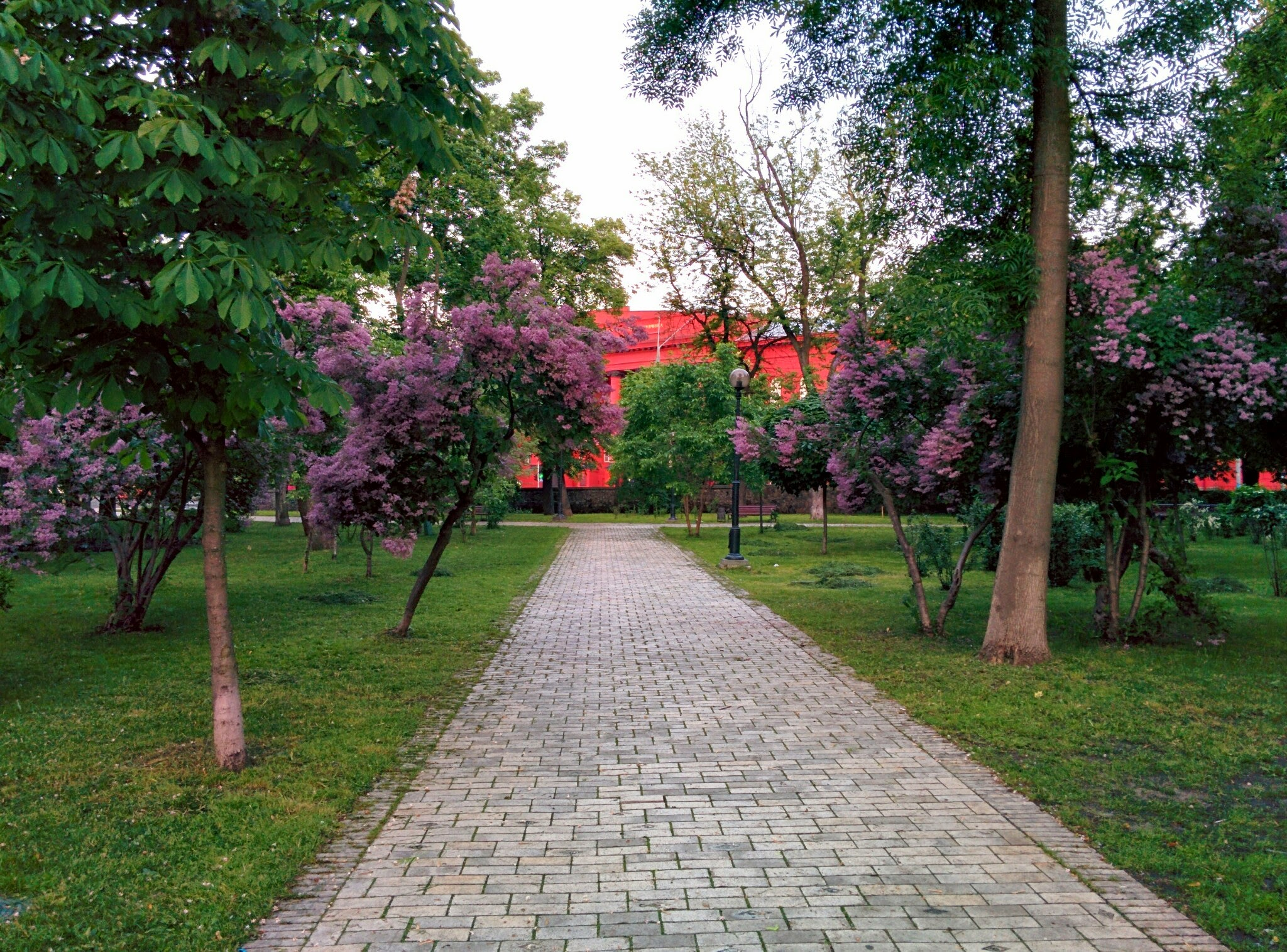 Парк імені Тараса Шевченка, Шевченківський район вул. Володимирська